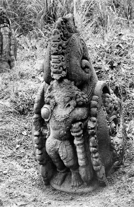 Negatief. Een Hindoeïstisch beeld uit de oudheid in Kampong Solok, Djambi, Sumatra